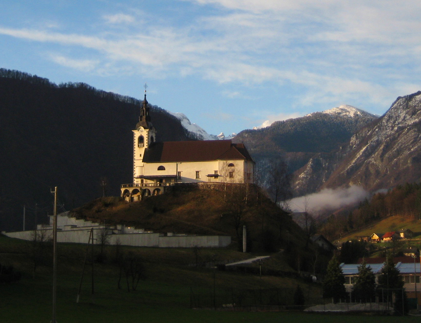 Zagorica near Kamnik, Slovenia